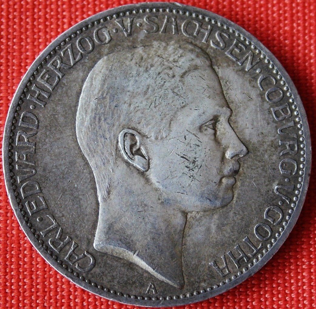 5 Mark mit Konterfei Carl Eduard aus dem Jahr 1907